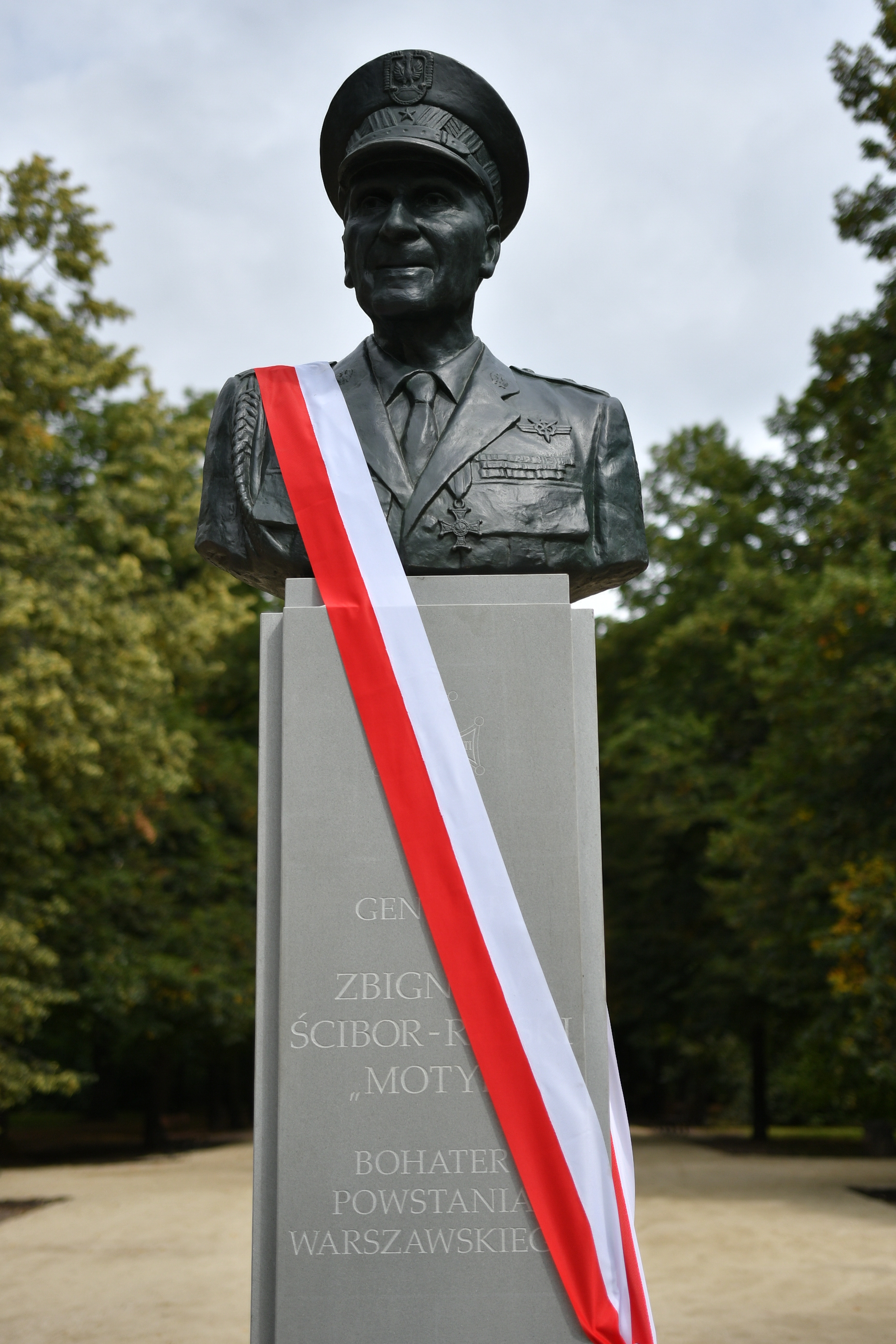 Pomnik gen. Zbigniewa Ścibor-Rylskiego w warszawskim parku Marszałka Edwarda Rydza-Śmigłego, odsłonięty 2 sierpnia 2019.